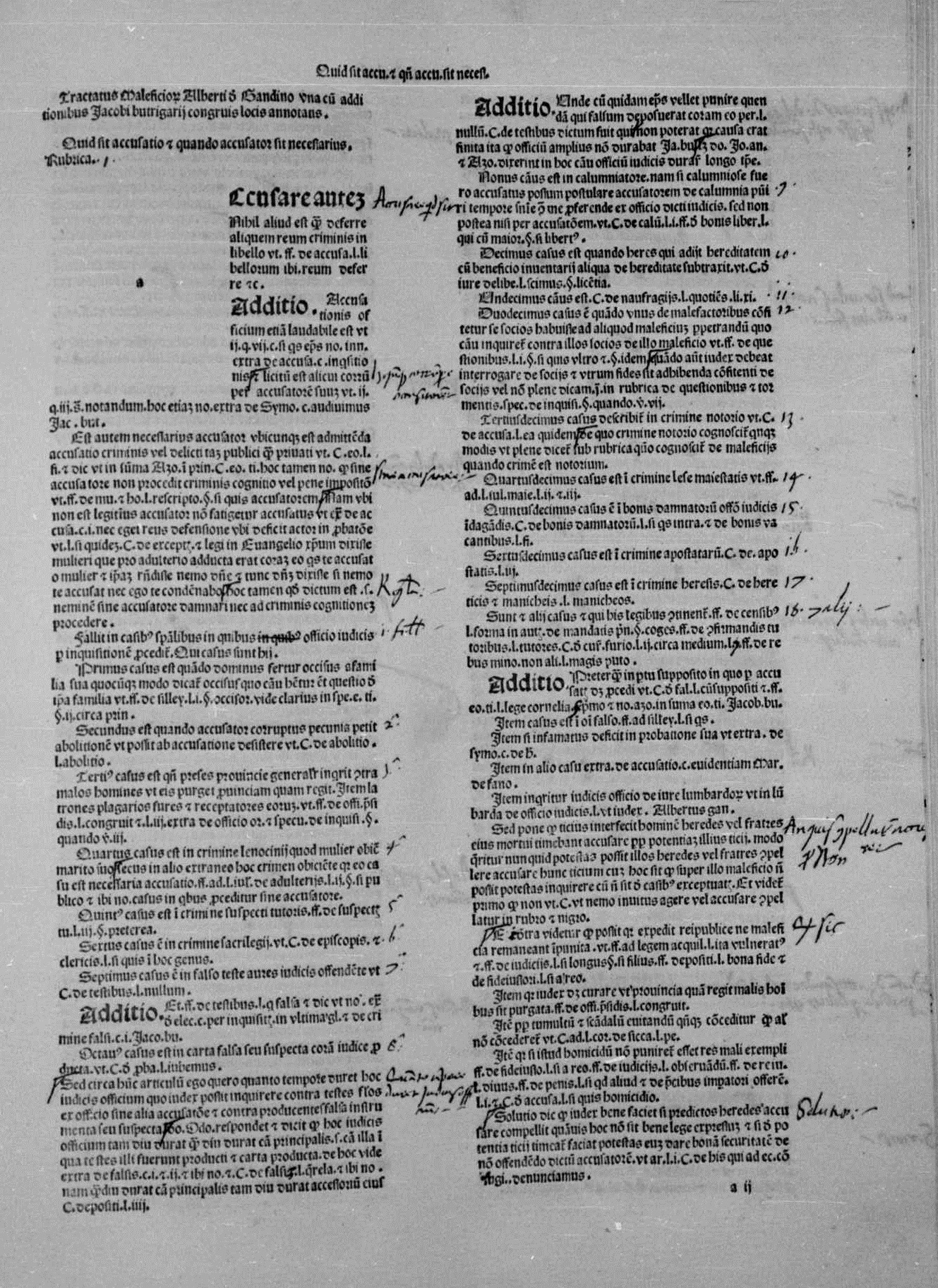 carta a2r